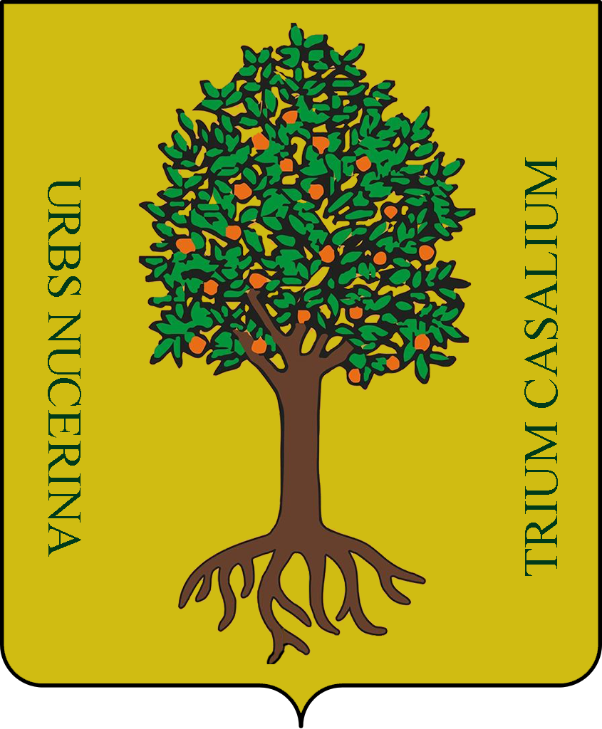 Riadattazione dello stemma dell'antica università di Nocera Tre Casali, realizzato seguendo le ricerche storiche usate anche dalle associazioni rievocative del territorio. La riproduzione è approssimata ed ha un puro fine informativo e didattico.